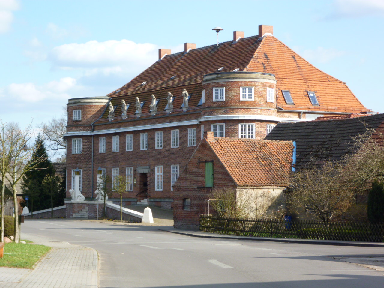 Calvörde-Dorst, Gutshaus Vorderansicht 2012